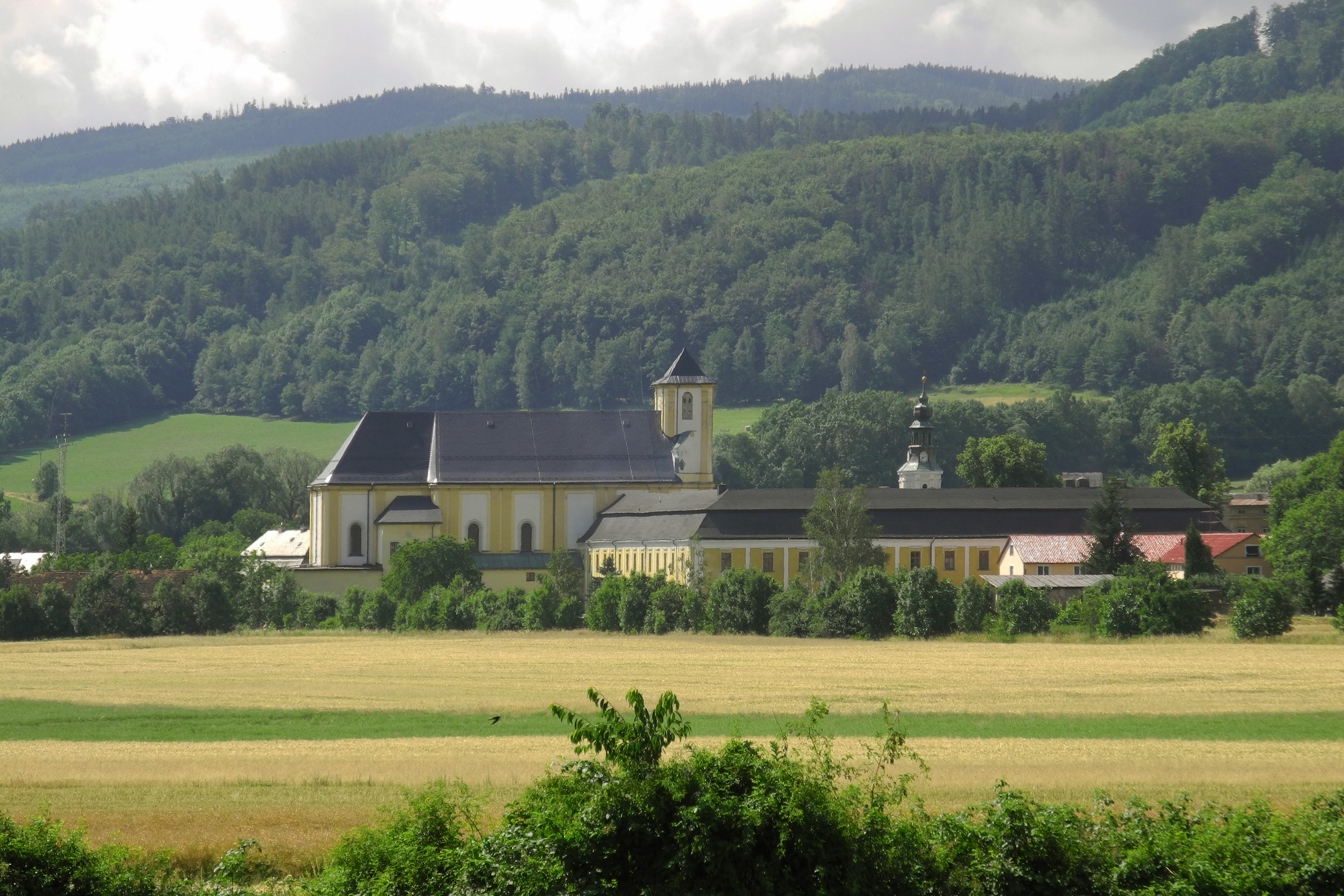 Blick auf das ehemalige Piaristenkolleg in Weißwasser in Schlesien (Bílá Voda)